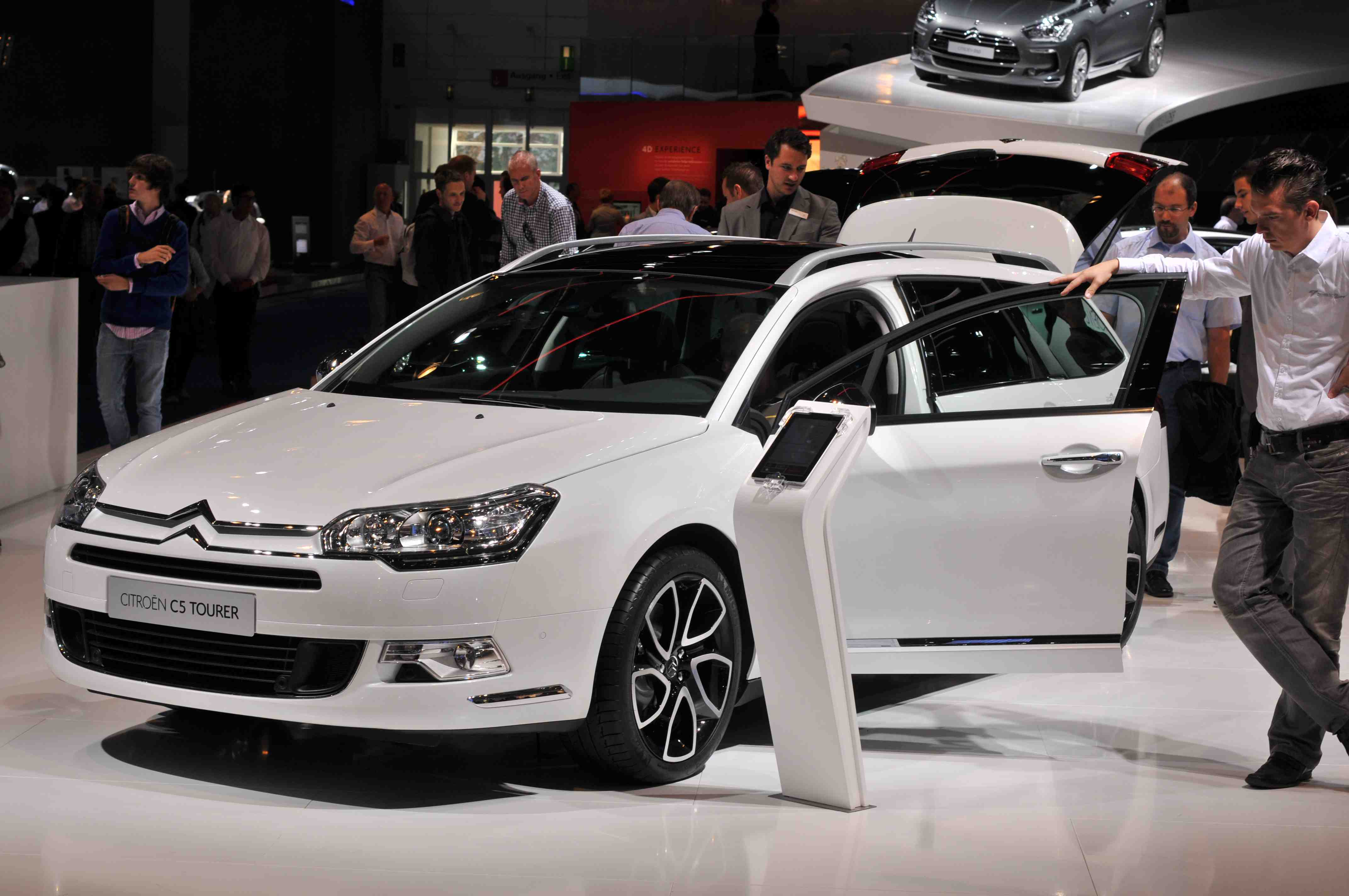 IAA 2011 - Internationale Automobilausstellung in Frankfurt/Main